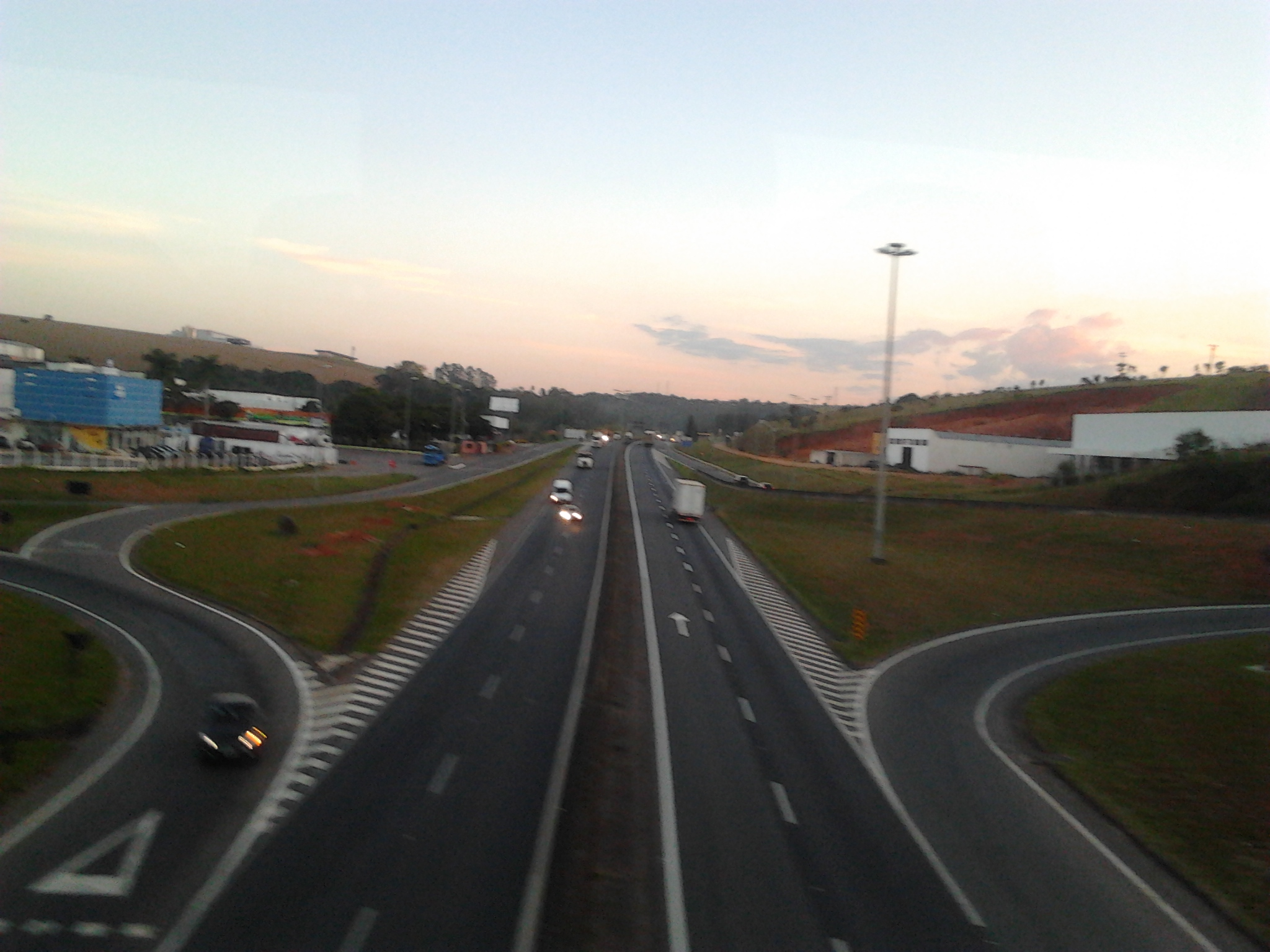 Trecho da rodovia fernão dias no entroncamento com a BR-491 em Pouso Alegre.